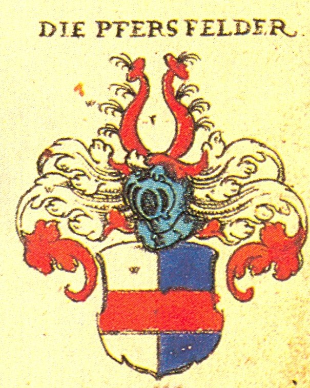 Ritterschaft und Adel in Franken Die Pferfelder